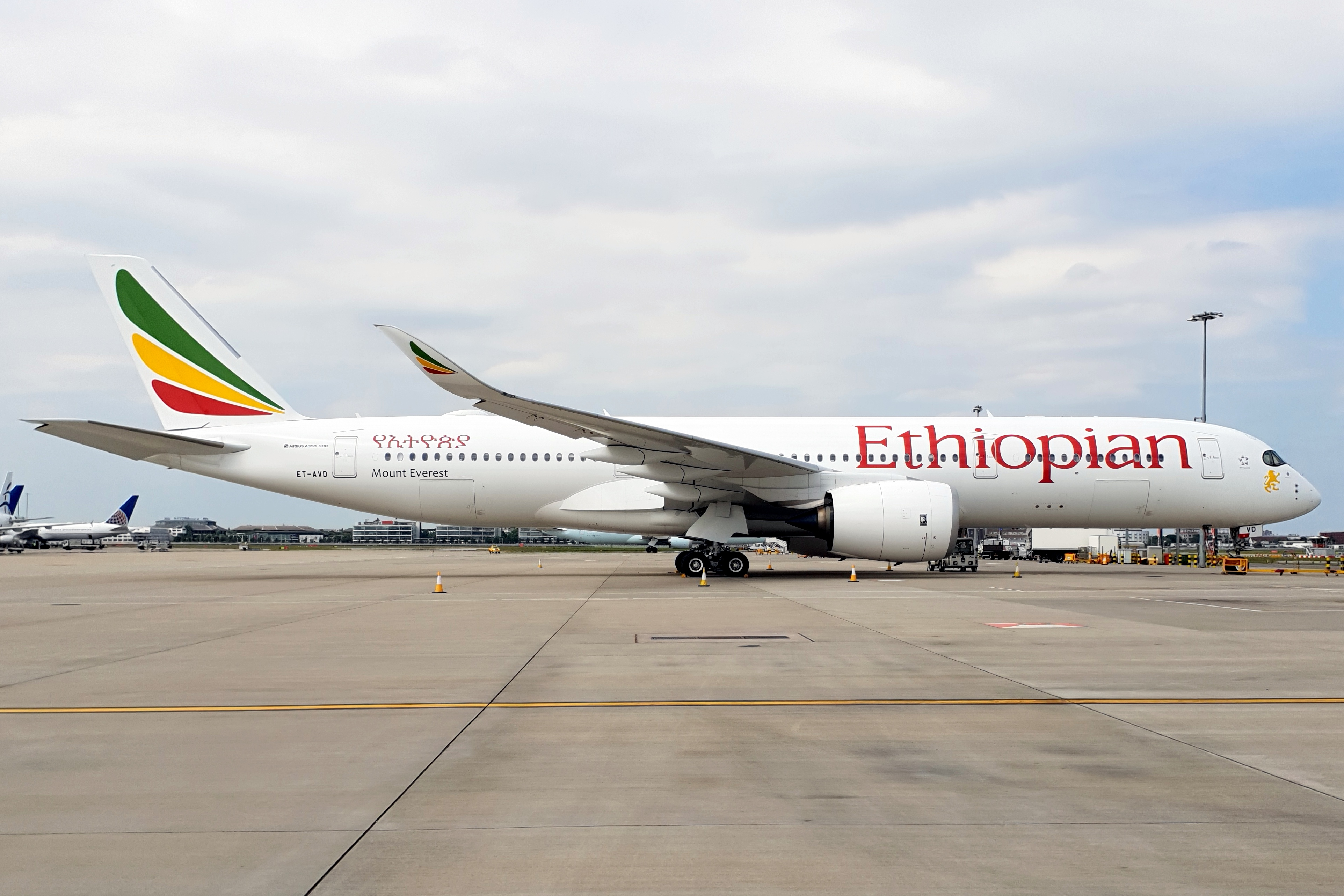 ET-AVD 08062018LHR